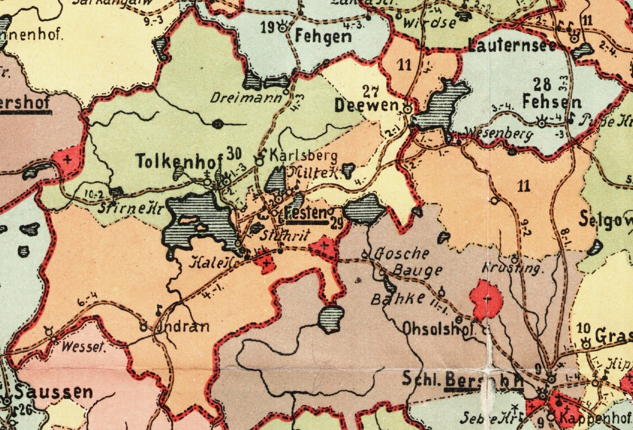 Võnnu kreisi Vestiena kihelkonna mõisad 1903. aasta kaardil.